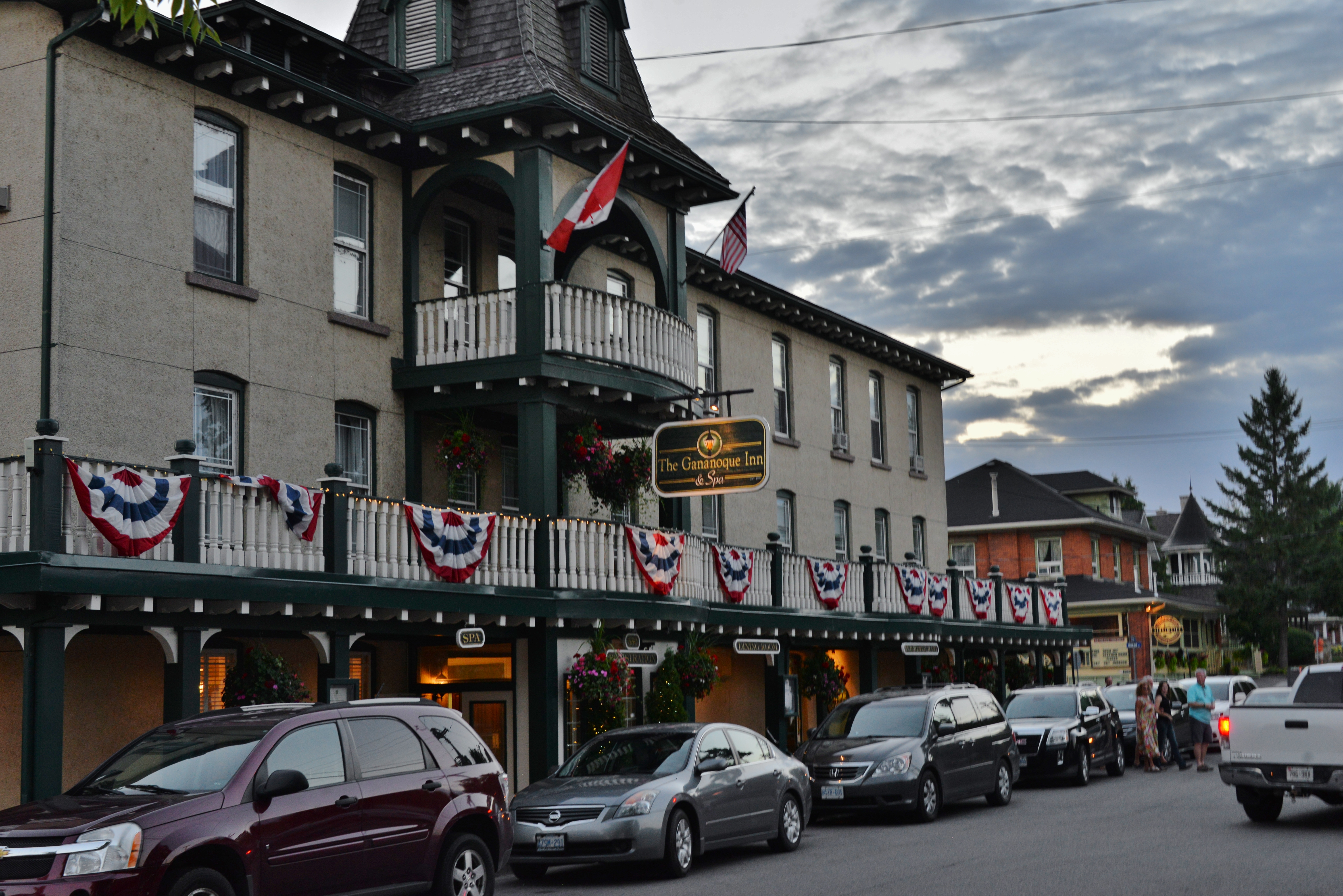 Готель Gananoque Inn у Ґананокве